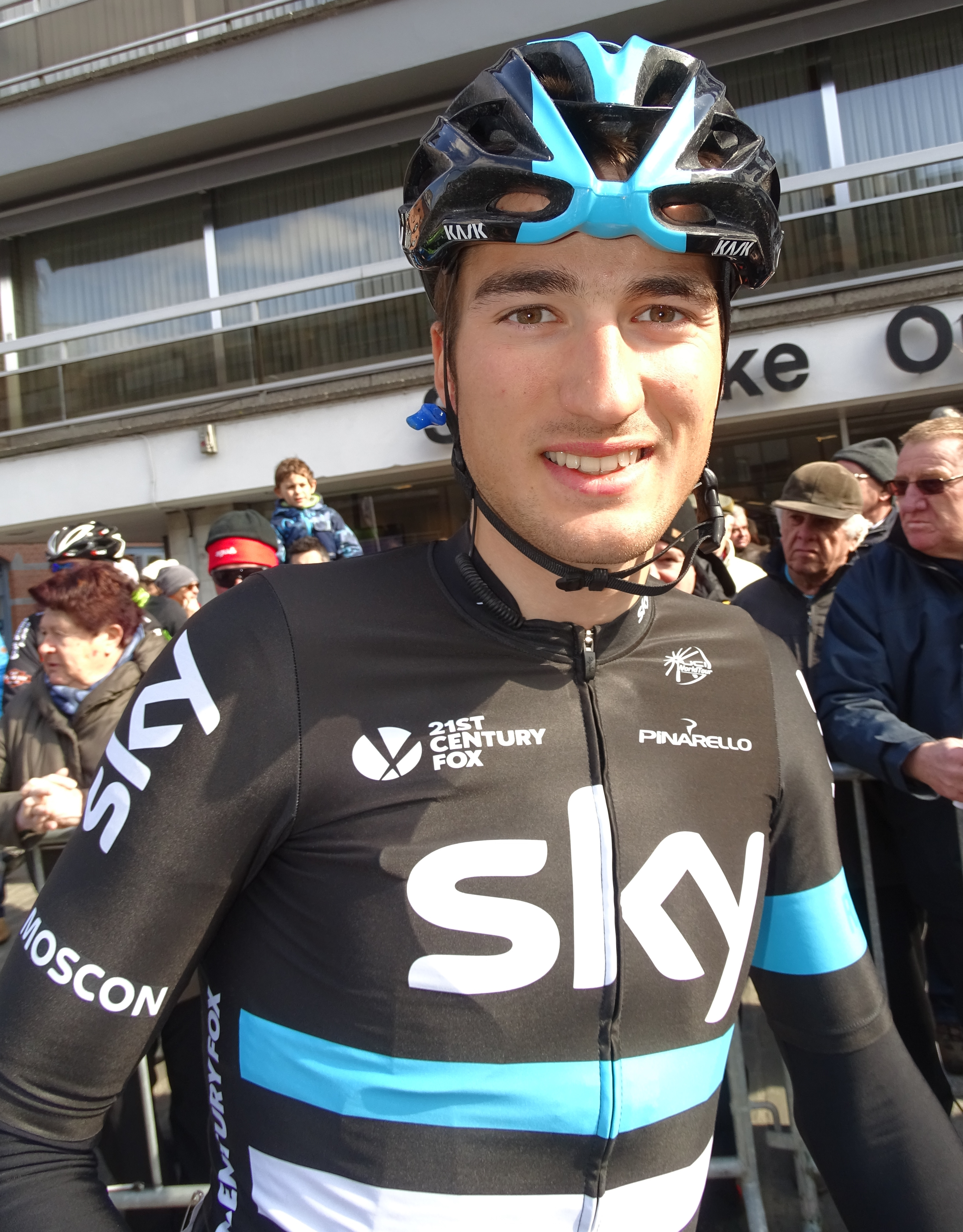 Reportage réalisé le mercredi 16 mars à l'occasion du départ de la Nokere Koerse 2016 à Deinze, Belgique.